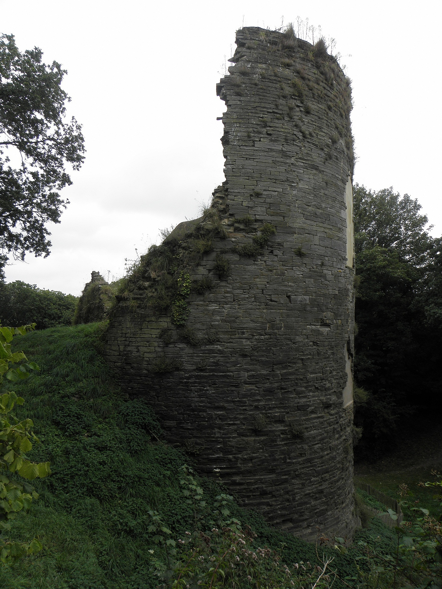 Ruines du donjon du château de Penhoat en Saint-Thégonnec (29). .